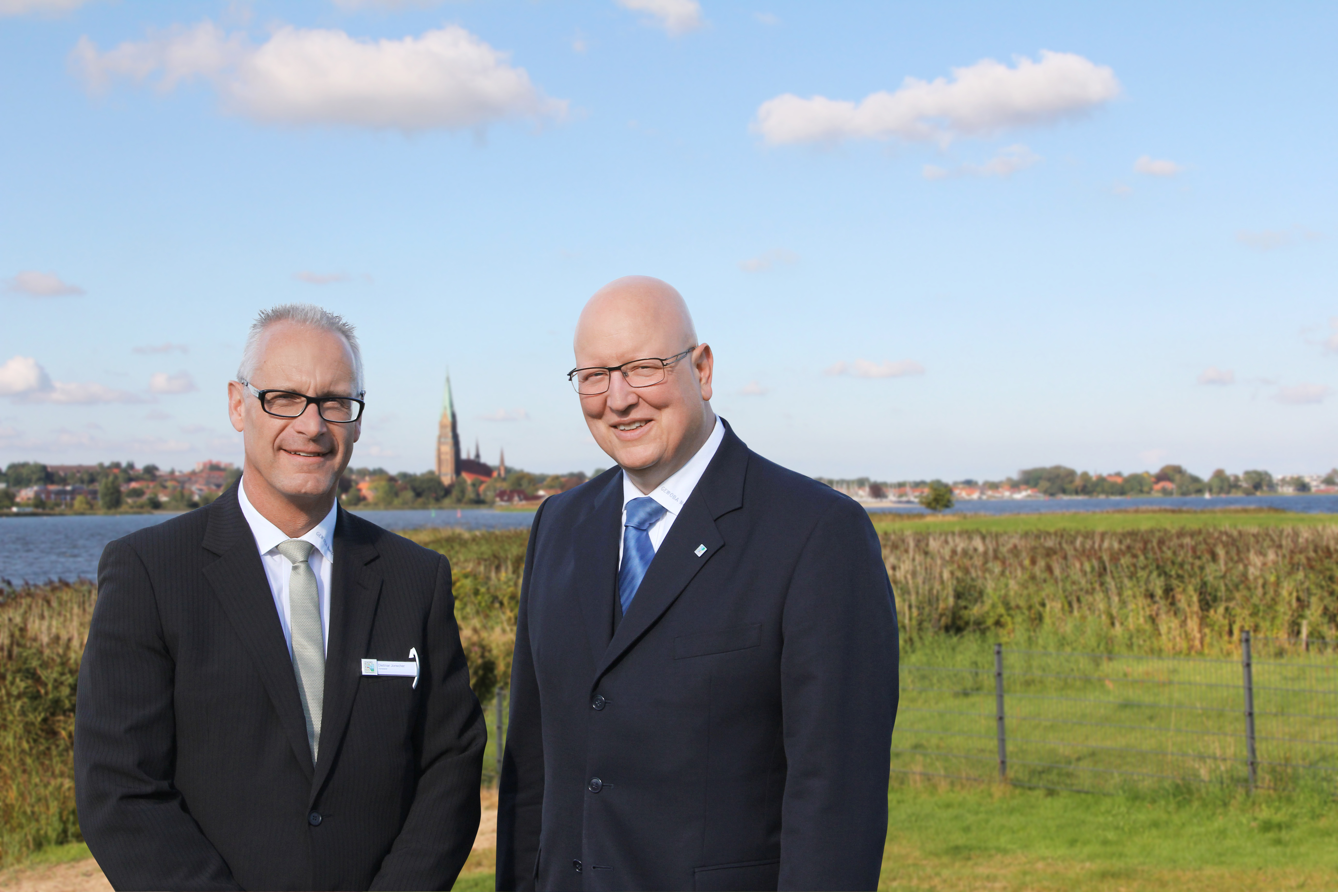 Der Vorstand: Dietmar Jonscher (links) und Steffan Liebscher